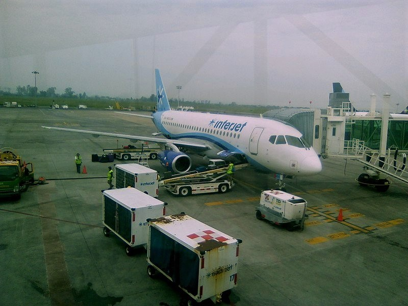 Sukhoi Superjet 100-95B (XA-NSG) en puertas de embarque en el Aeropuerto de Guadalajara